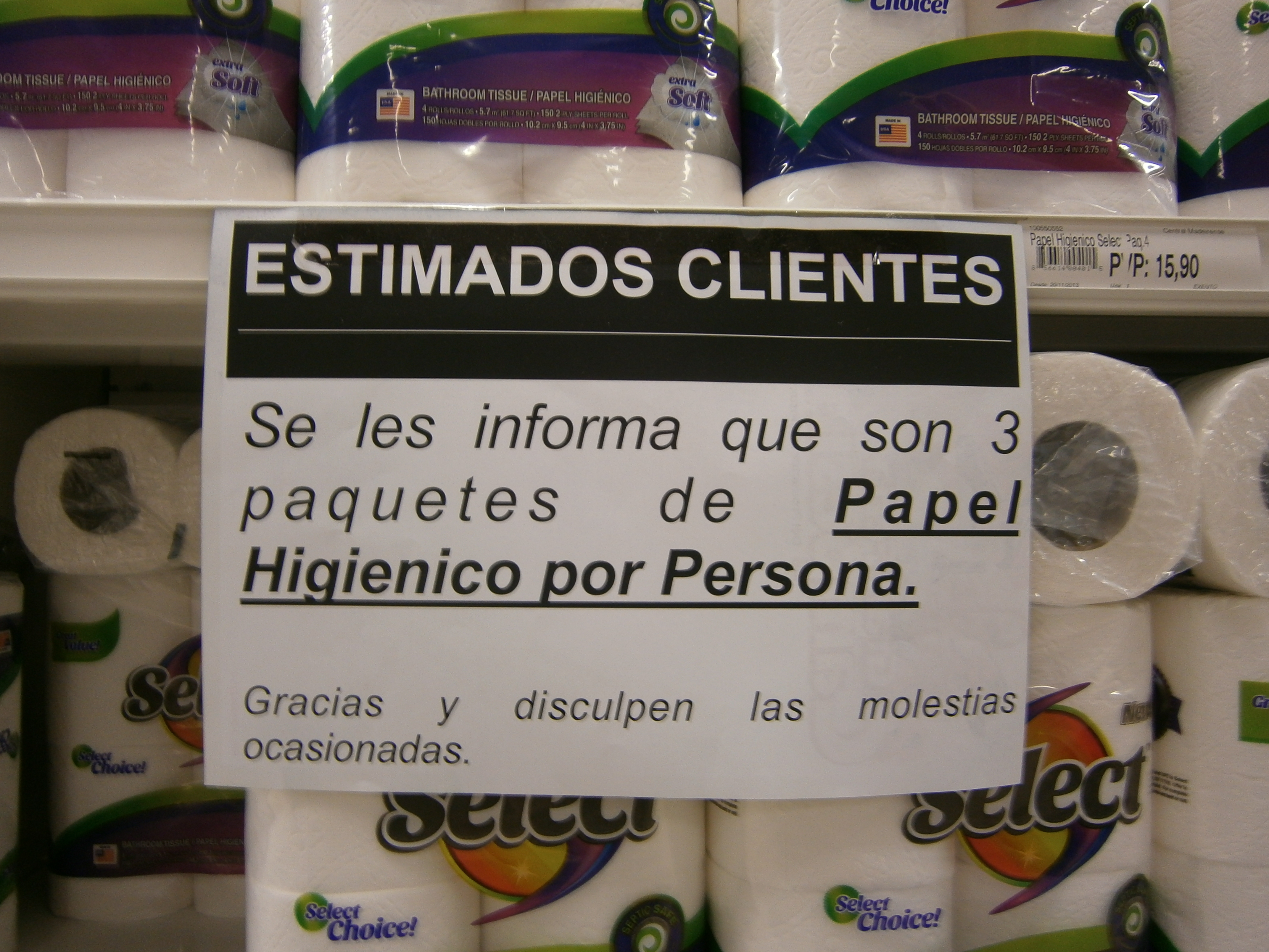 Escasez en Venezuela, Sigo